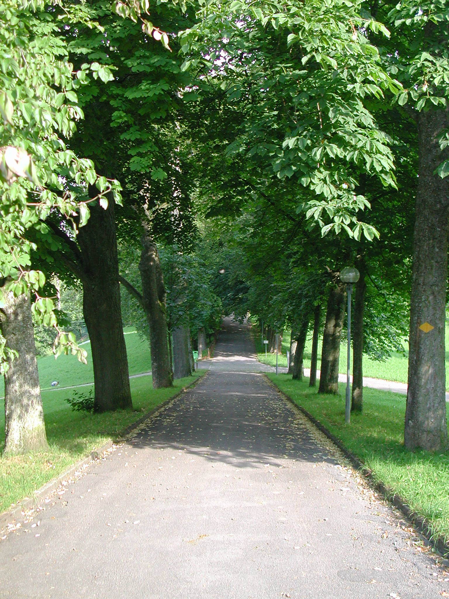 Baumallee in der Elfenau in Bern